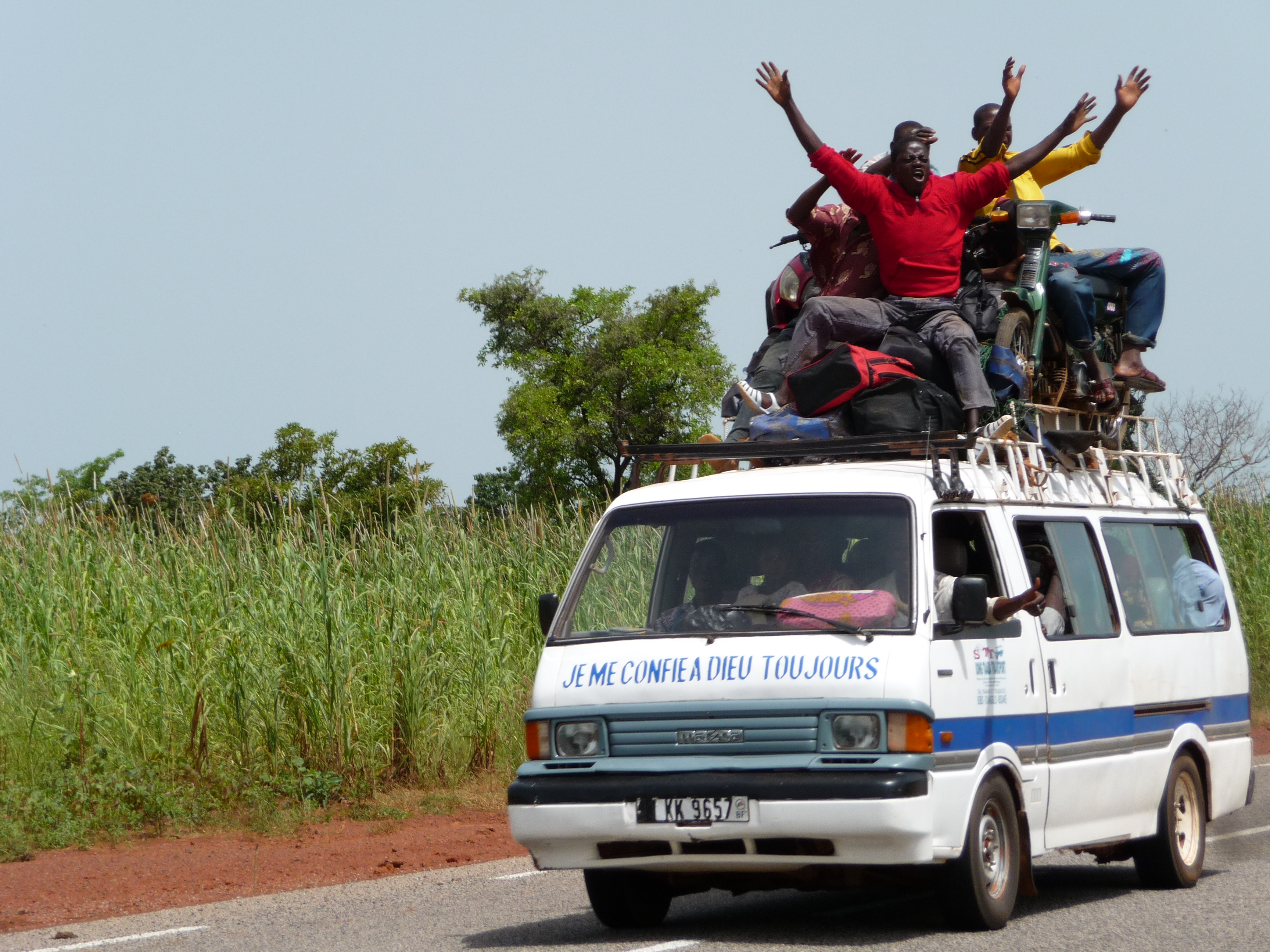 Les messages sur les bus taxi brousse sont toujours inventifs et invitent à avoir confiance dans le chauffeur. This is an image with the theme "Africa on the Move or Transport" from: Burkina Faso